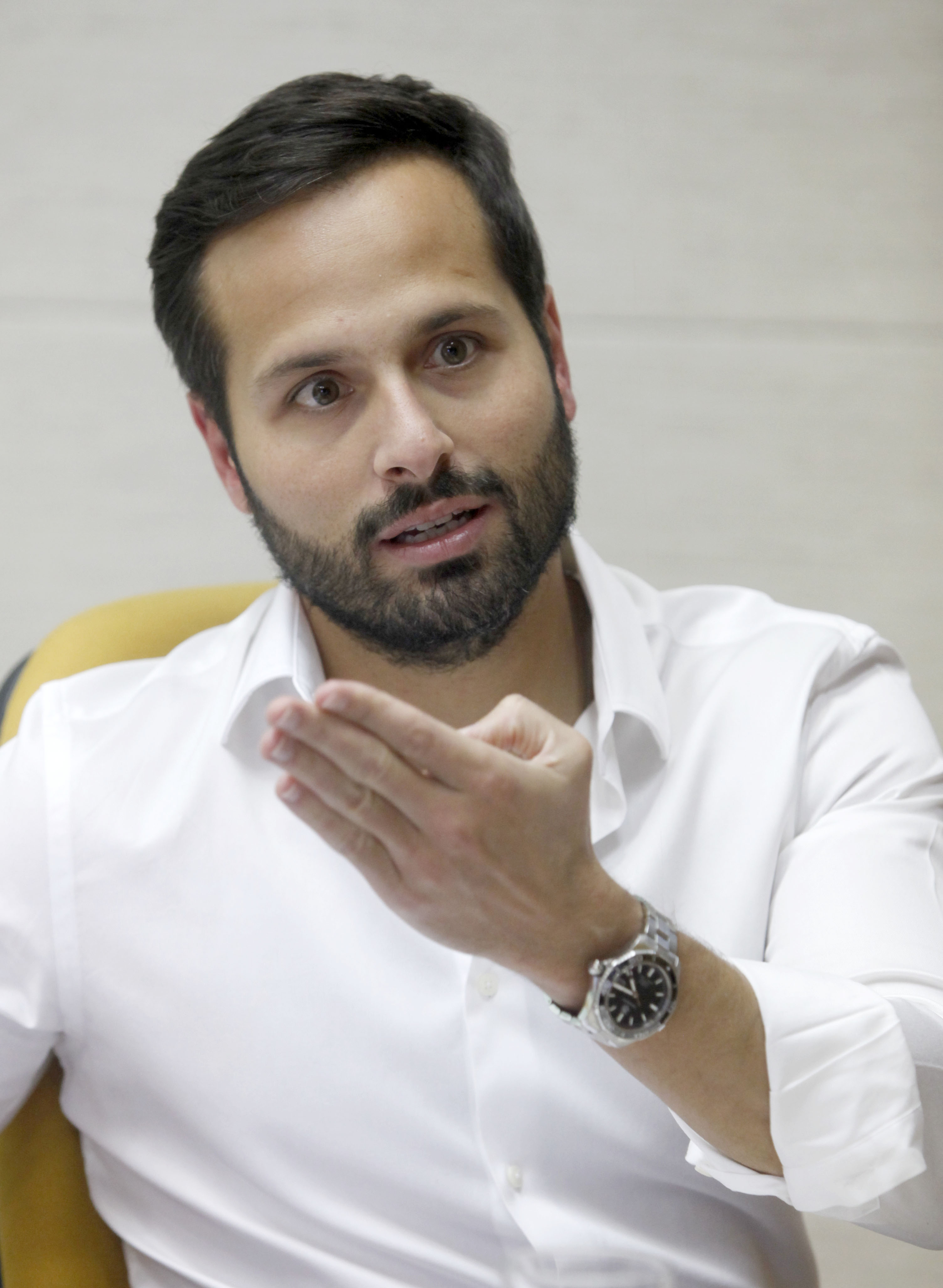 Brasília, 26 de maio de 2016. Ministro da Cultura, Marcelo Calero. Foto: Ana Nascimento/MinC